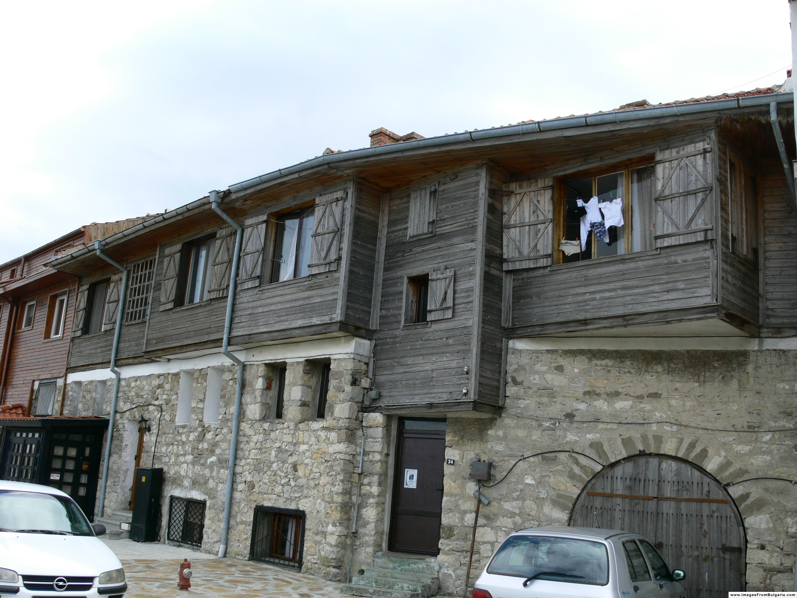 Nesebar, Bulgaria